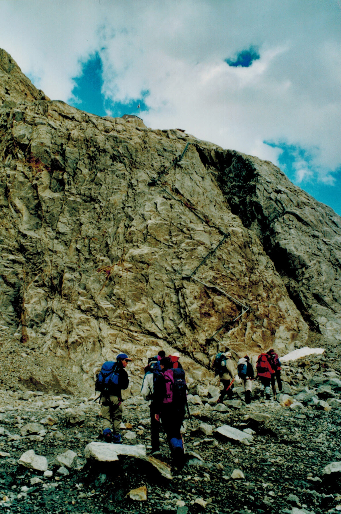 Stahltreppe als Zugang zur Konkordiahütte